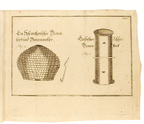 Plate from Naturgeschichte, Klassifikation und Nomenklatur der Insekten vom Bienen,....